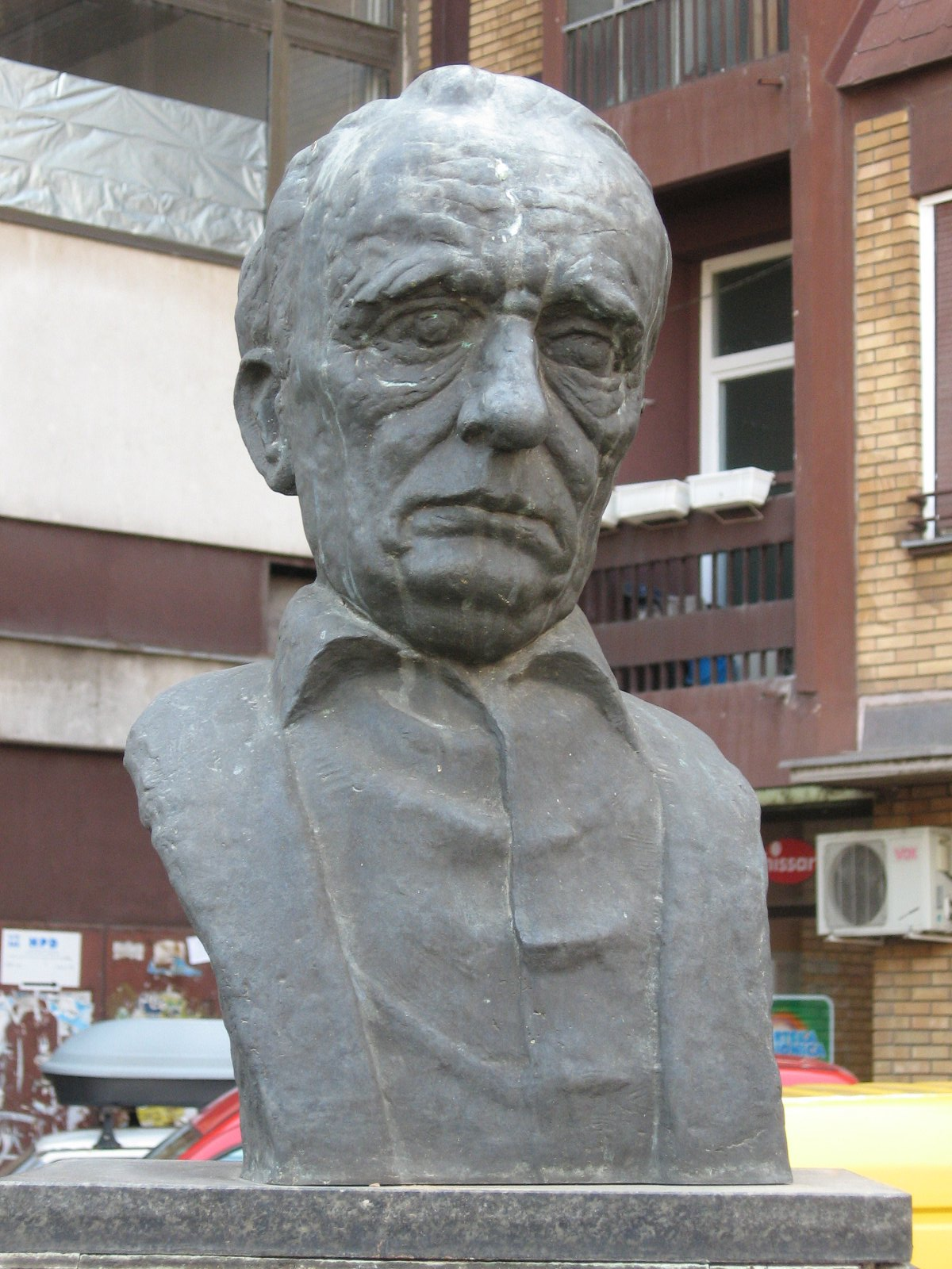 Споменик Душку Радовићу. Снимљено у априлу 2010.